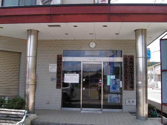 あやバスの上林線・於見市野瀬線の発着場となる大町バスターミナル（上林いきいきセンター）